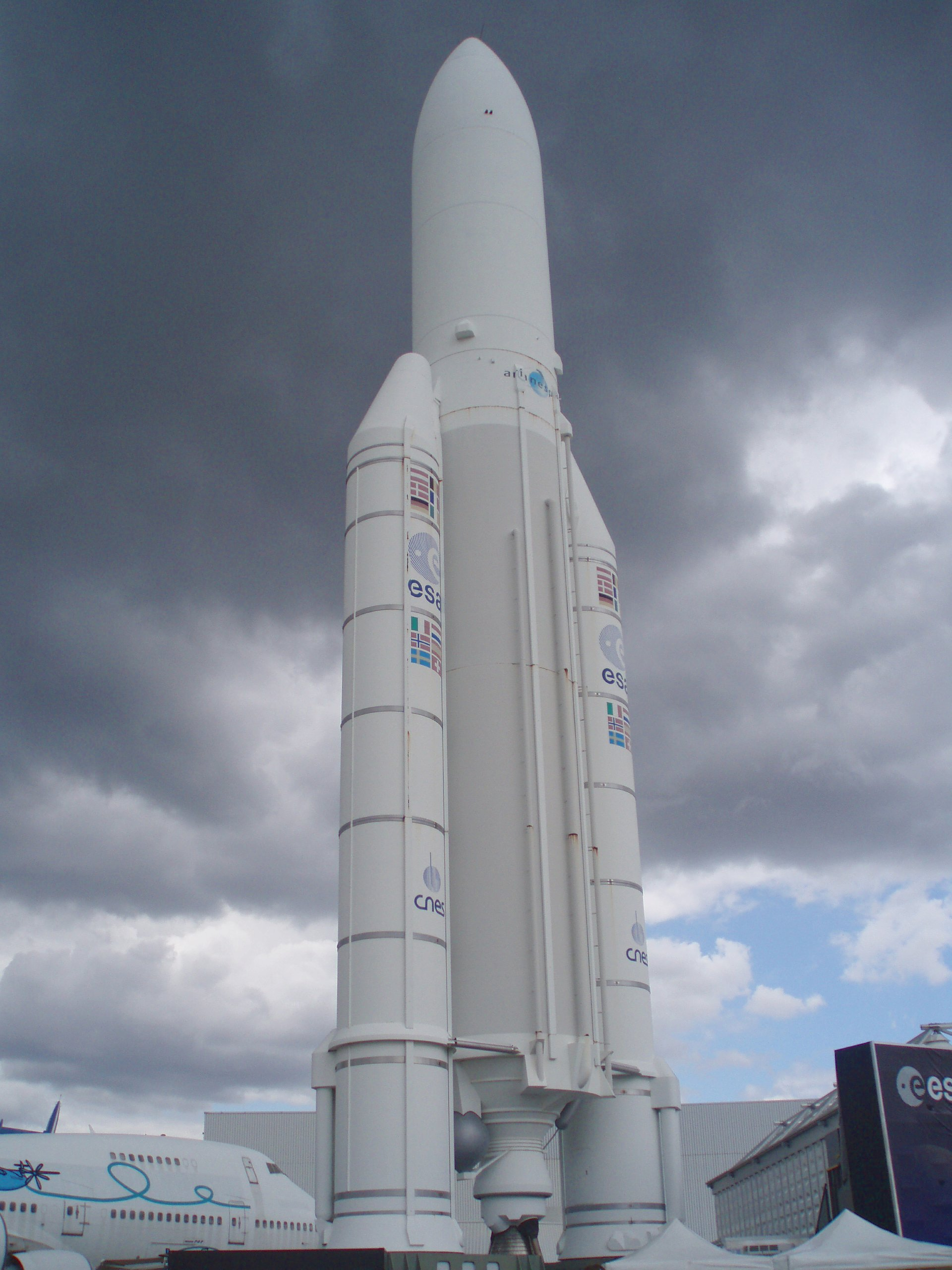 Ariane 5 Rocket, Musée de l'Air et de l'Espace, Le Bourget